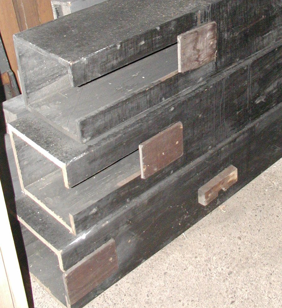 Orgelpfeifen eines Open Diapason 16' - hier von Keates (1907); selbst erstellt 10/2006 durch Benutzer:Kantor.JH